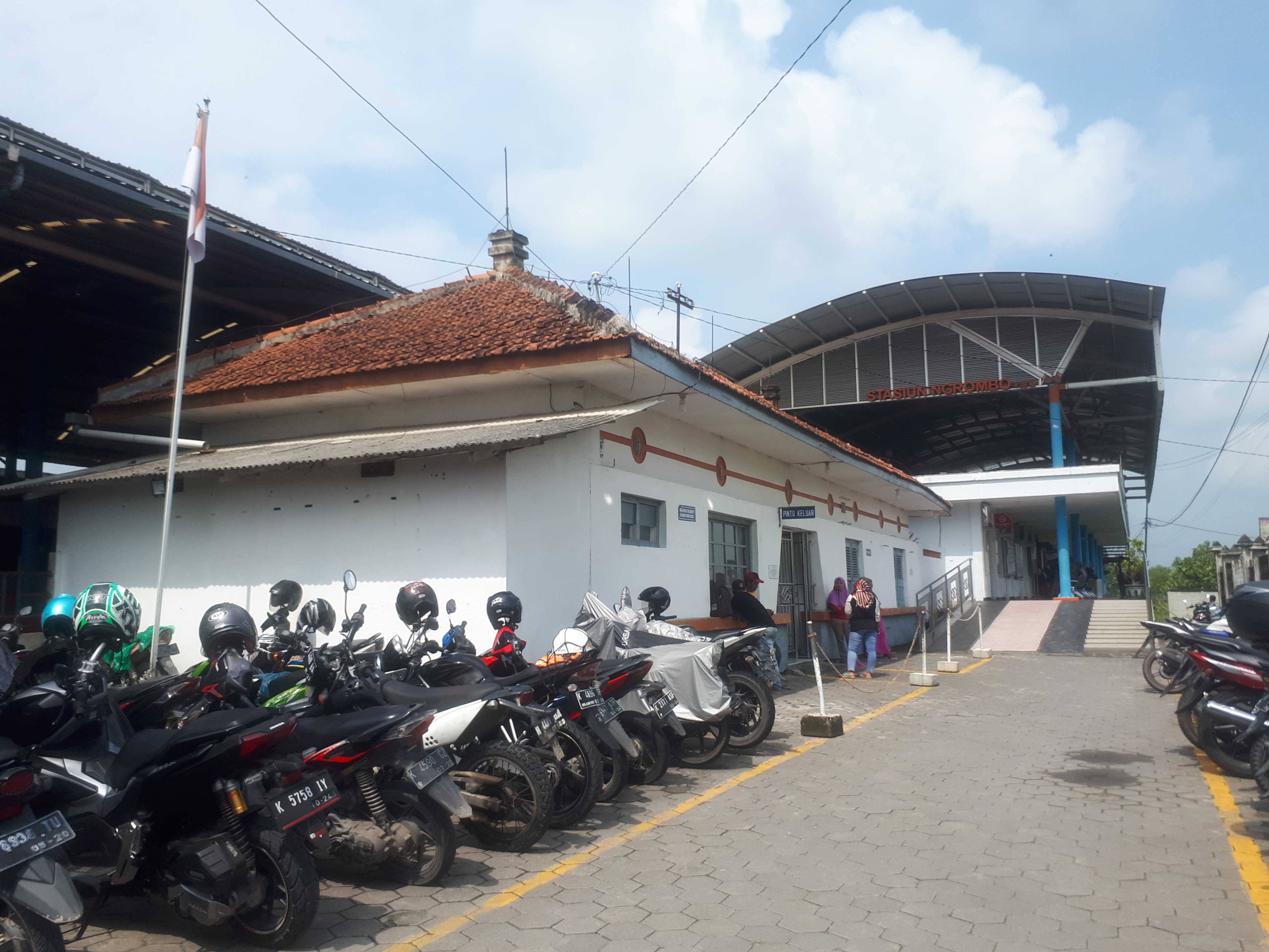 Tampak depan Stasiun Ngrombo tahun 2020